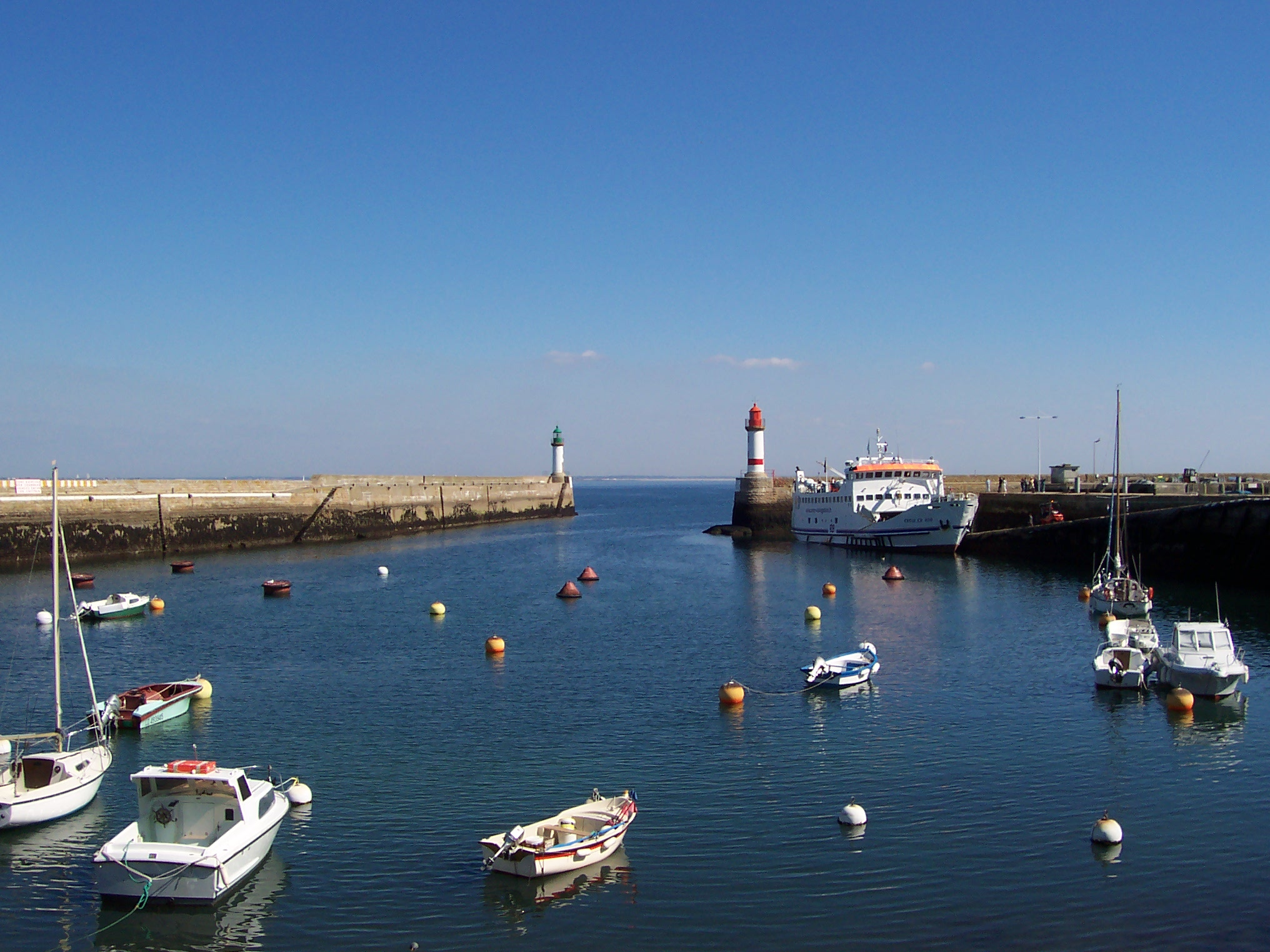 Vue du bassin principal bassin de Port-Tudy, avec au second plan, le Kreiz-er-Mor, l'un des 2 navires effectuant les liaisons maritimes.(île de Groix, Morbihan, France) Licensing Source: Thomas Basset Licence